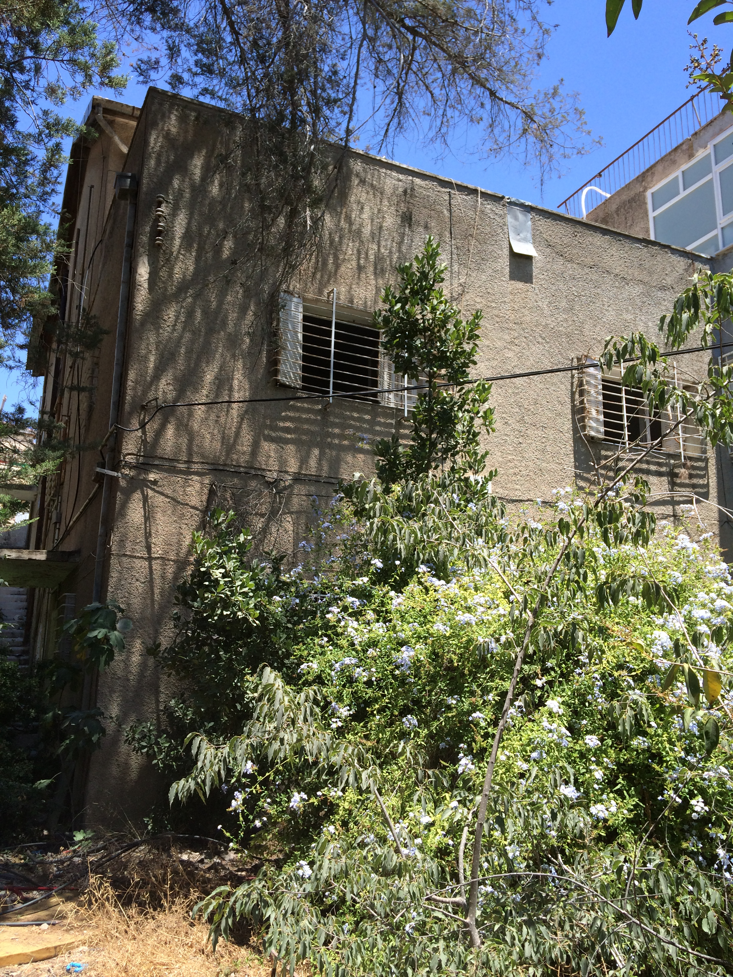 ביתו של של גרשום שלום ברחוב אברבנל 28 בירושלים